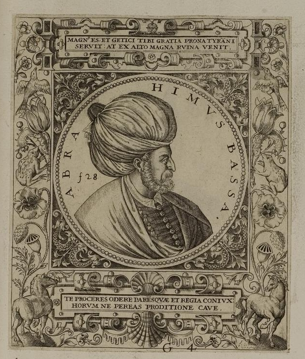 Grafik aus dem Klebeband Nr. 1 der Fürstlich Waldeckschen Hofbibliothek Arolsen Illustration aus: Georg Greblinger: Wahre Abbildungen der Türckischen Kayser vnd Persischen Fürsten / so wol auch anderer Helden und Heldinnen von dem Osman / biß auf den andern Mahomet. Johann Ammon, Frankfurt 1648 Motiv: "Abrahmius Bassa" (Pargalı Ibrahim Pasha, Großwesirs Süleymans I.)